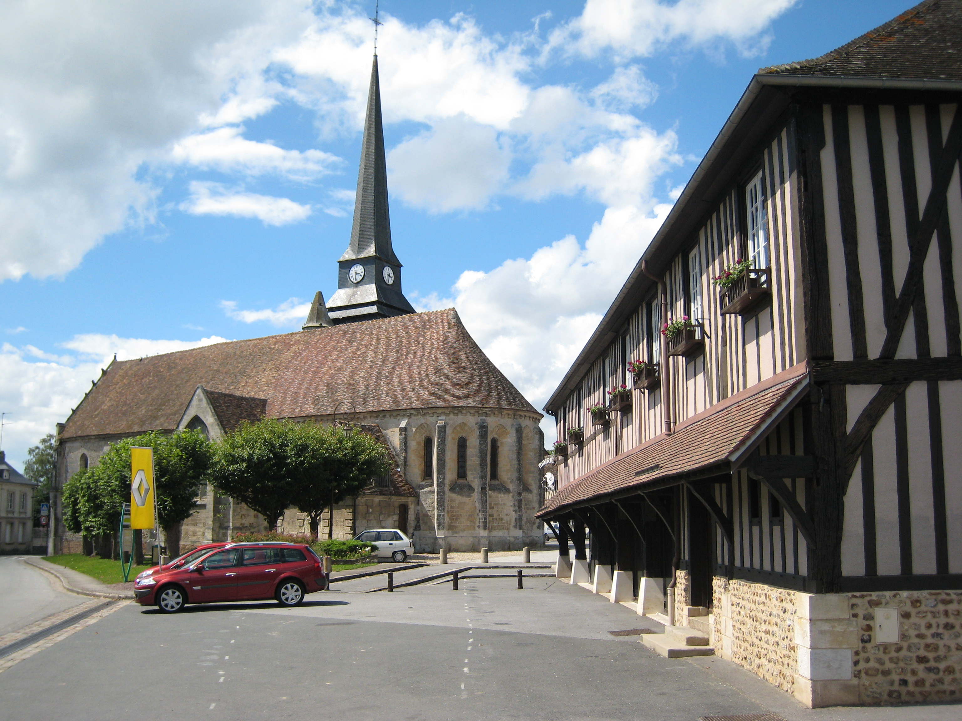 Église d'Harcourt, Eure, France